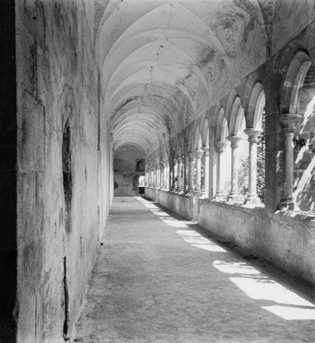 Imatge